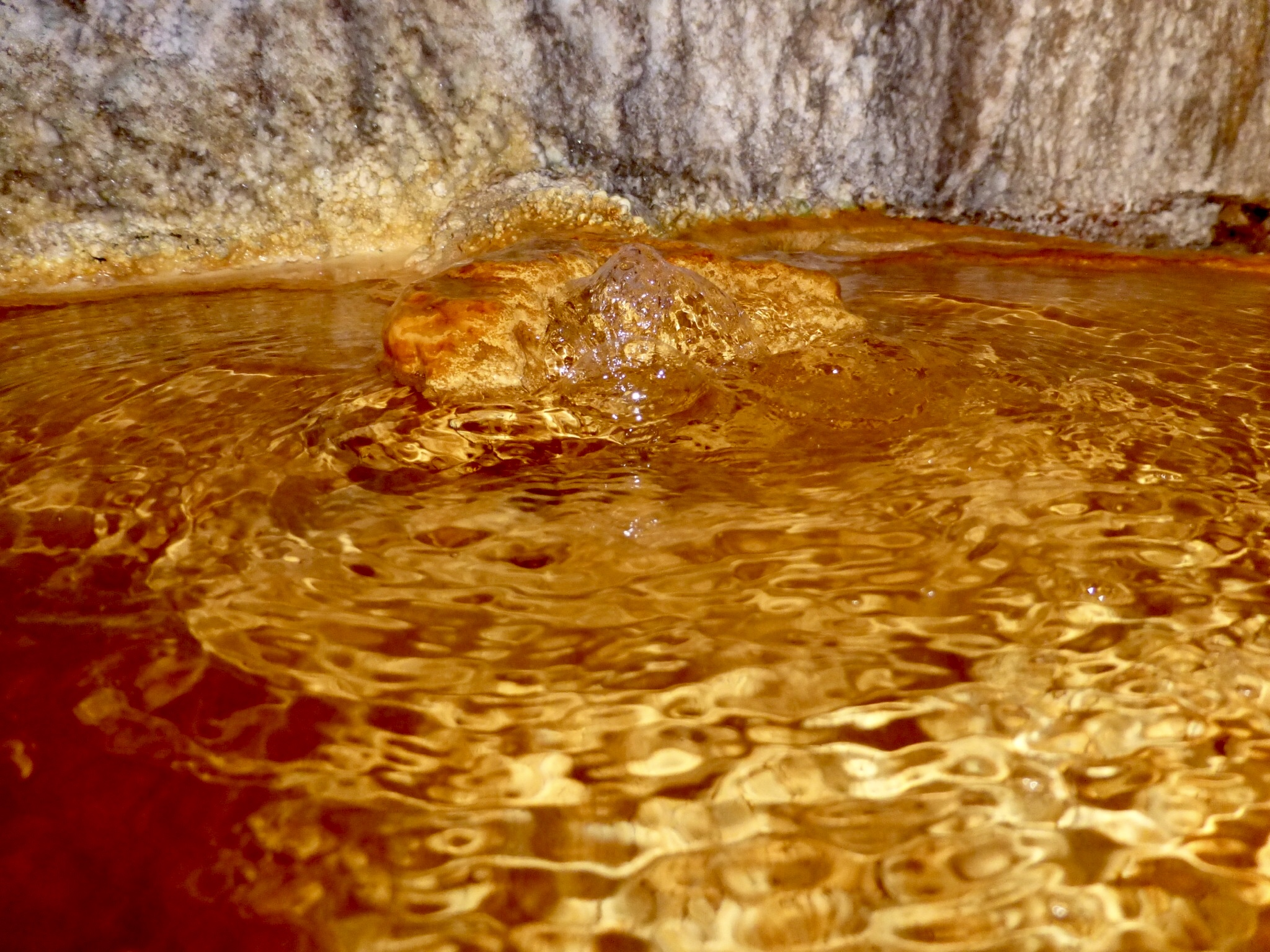 Fuente termal en Puente del Inca, ubicada en el túnel que conecta el antiguo hotel con los baños termales